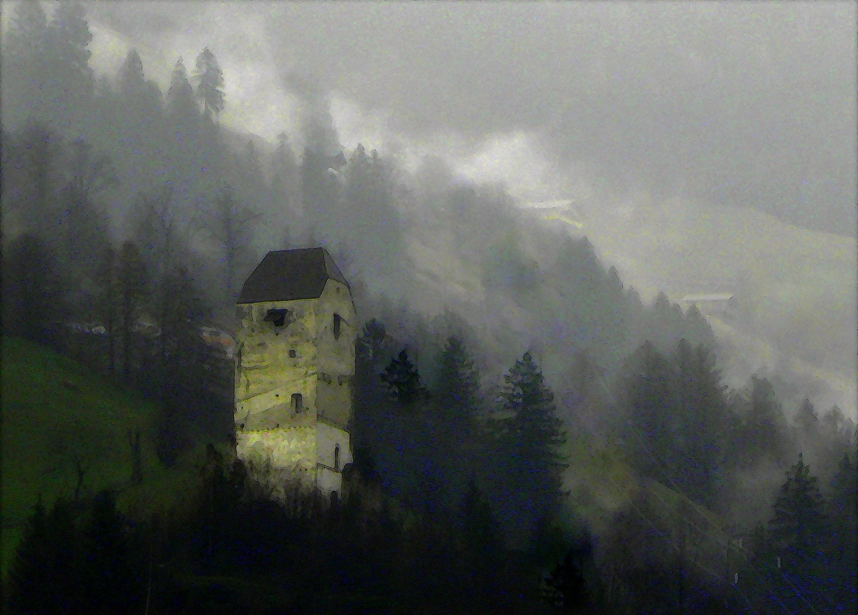 St. Leonhard Passeier Valley